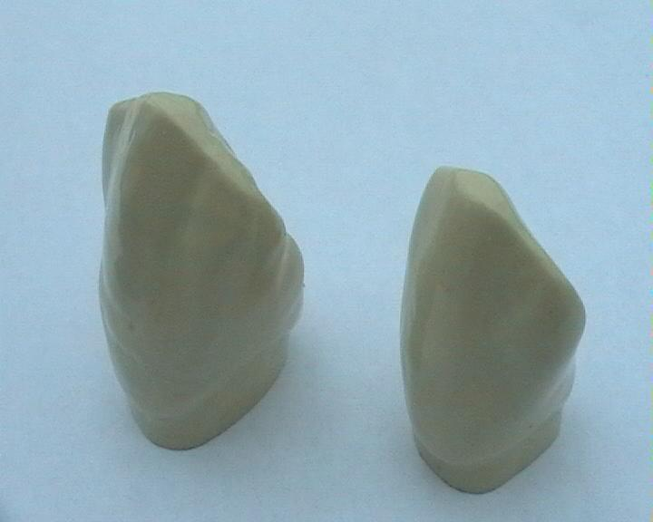 Oberer(links im Bild) und unterer Eckzahn (rechts im Bild) von vestibulär